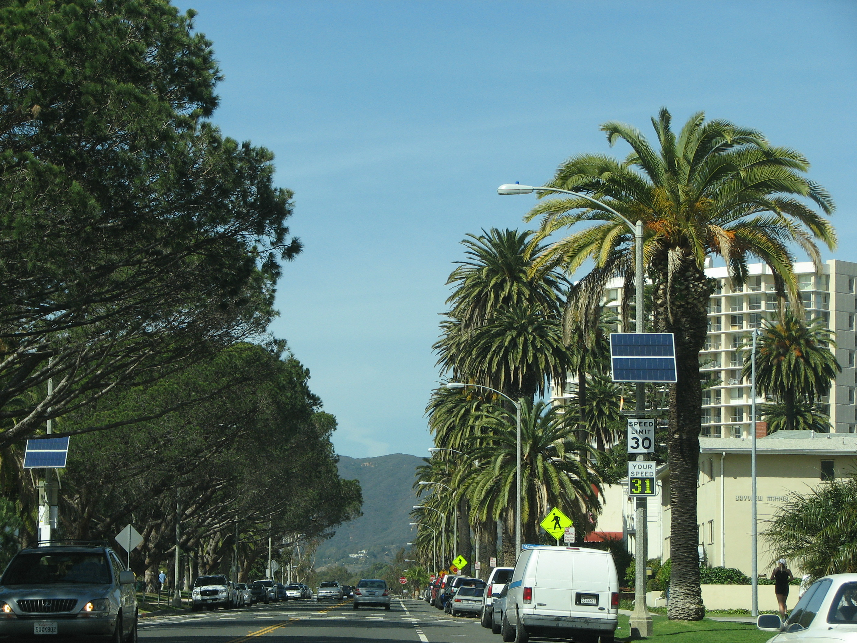 palm lined Ocean Avenue in Santa Monica, near Maguerita Ave.